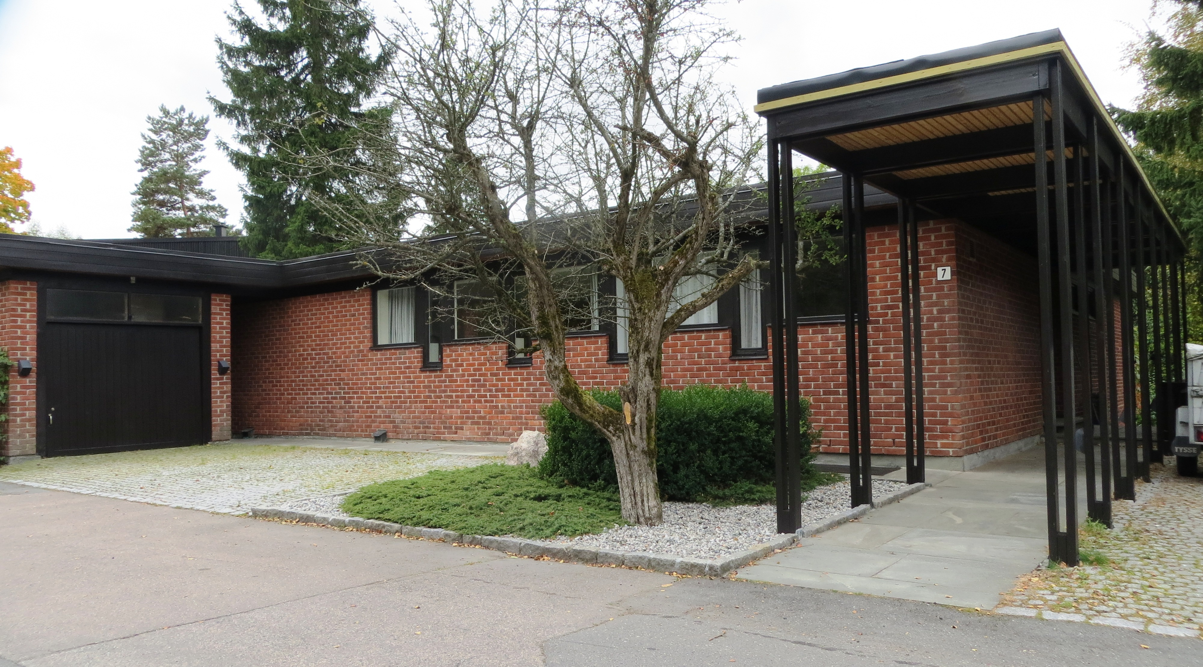 Kommunalt vernet villa (Byantikvarens gule liste) på Ullernåsen / Rustad / Røa, i Oslo.